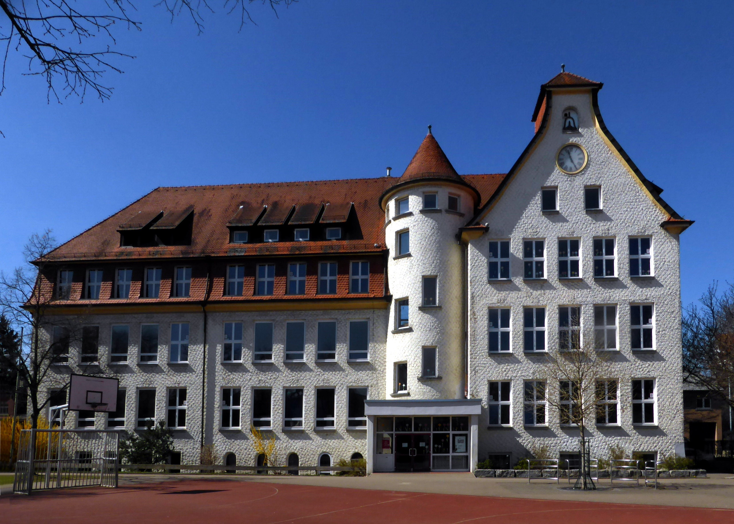 Die Bohlschule in Aalen, Ostseite.